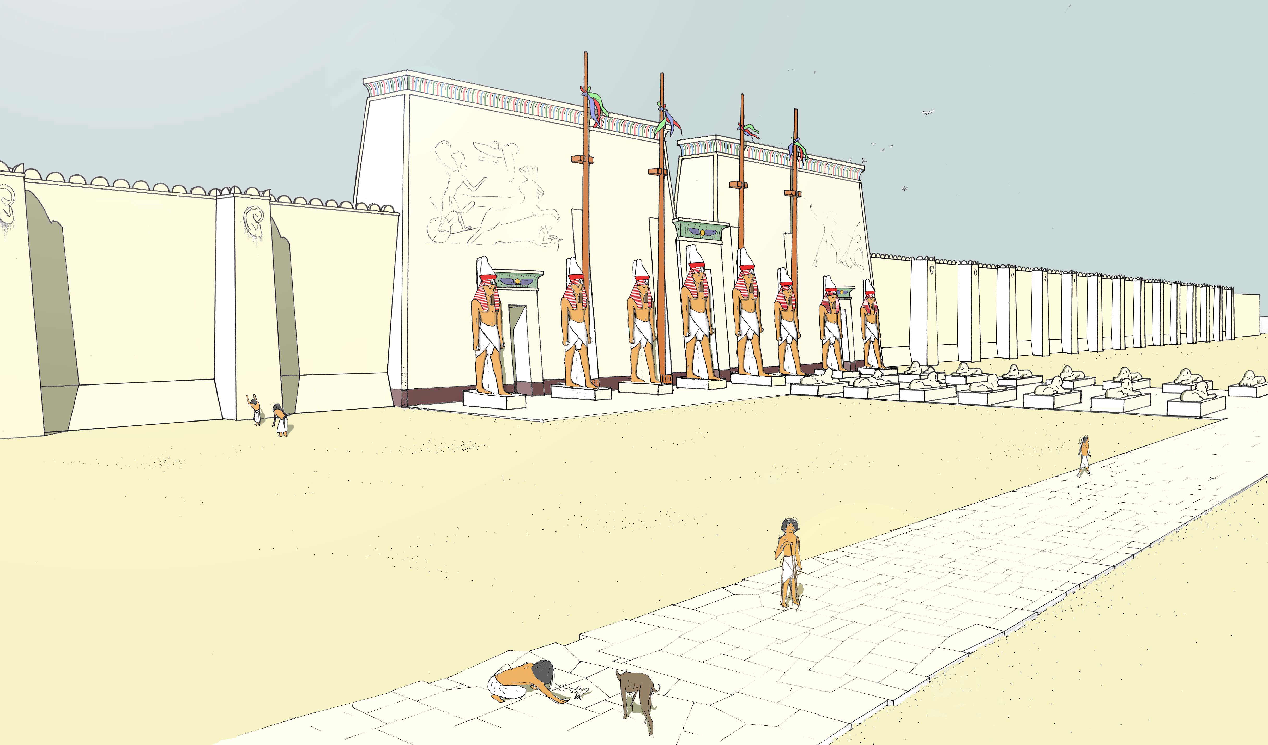 Reconstitution de la façade ouest du grand temple de Ptah à Memphis (XIXe dynastie)